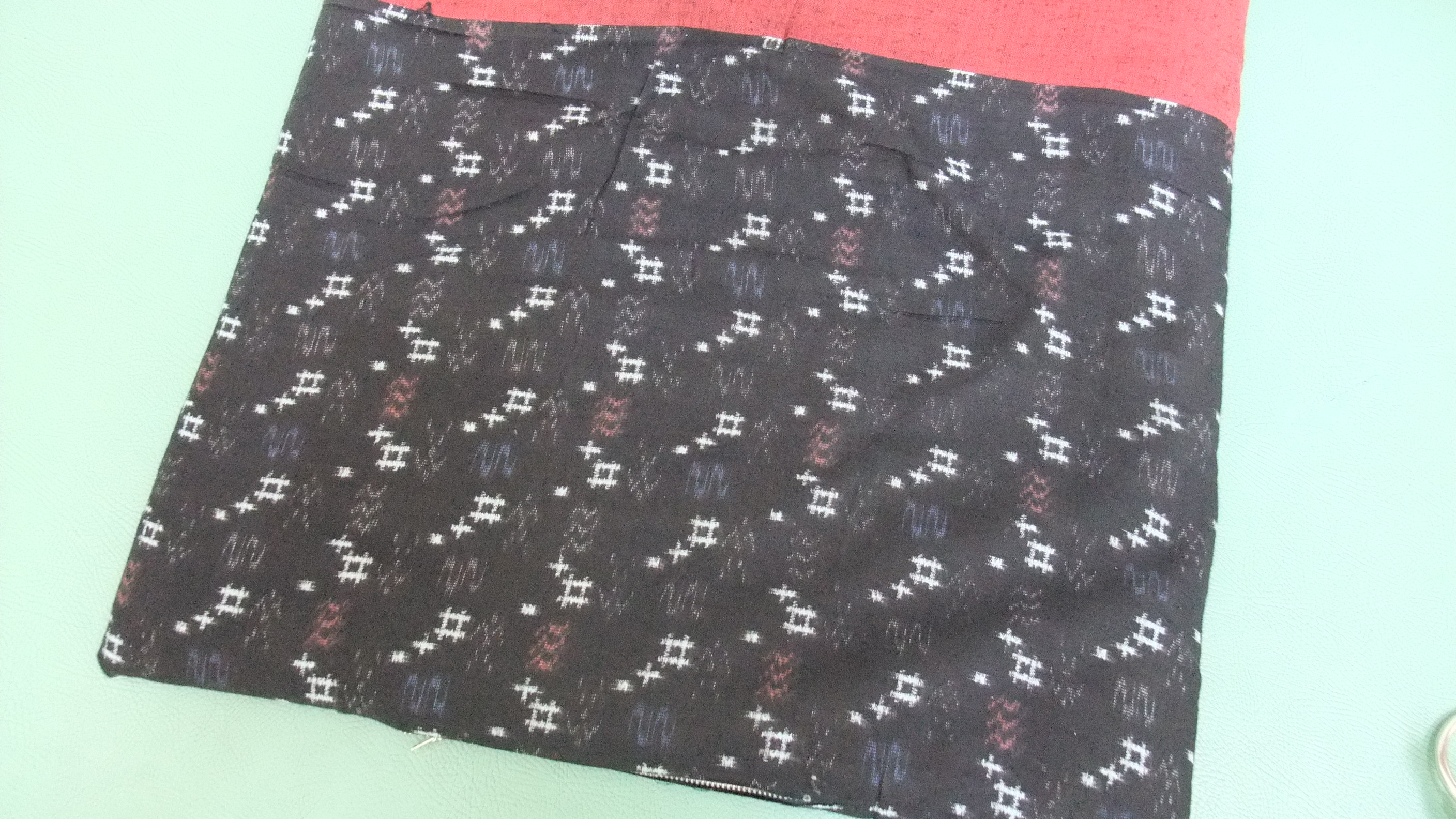 備後絣で作られた座布団。私の実家で製造していた生地を使用して、造られたもので、商品として流通したものではありません。